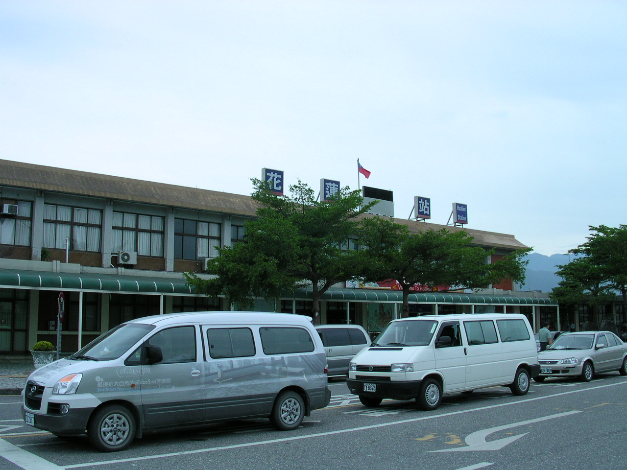 中文（台灣）: 臺灣鐵路管理局花蓮車站。